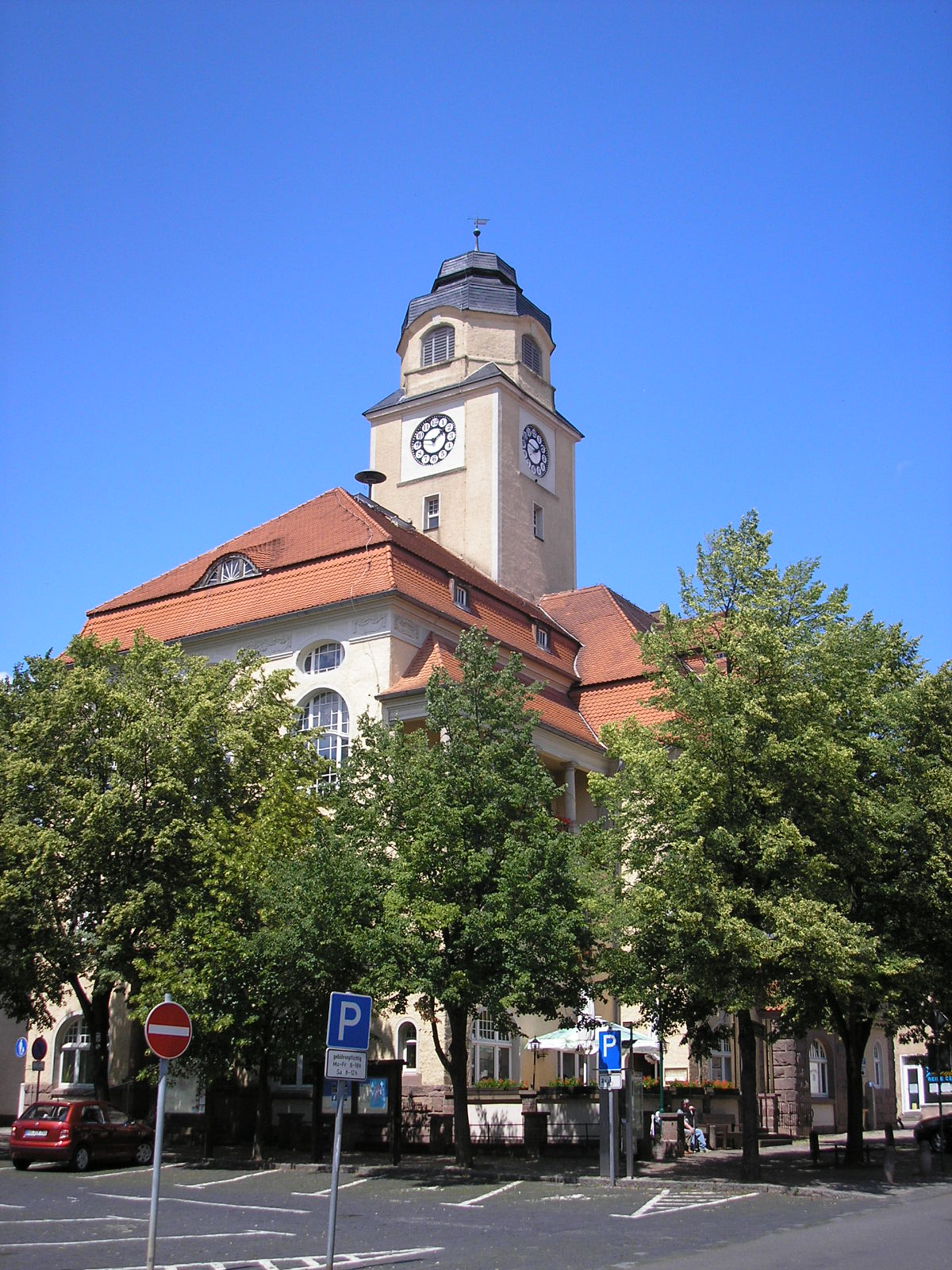 Das Rathaus in Artern (Thüringen)